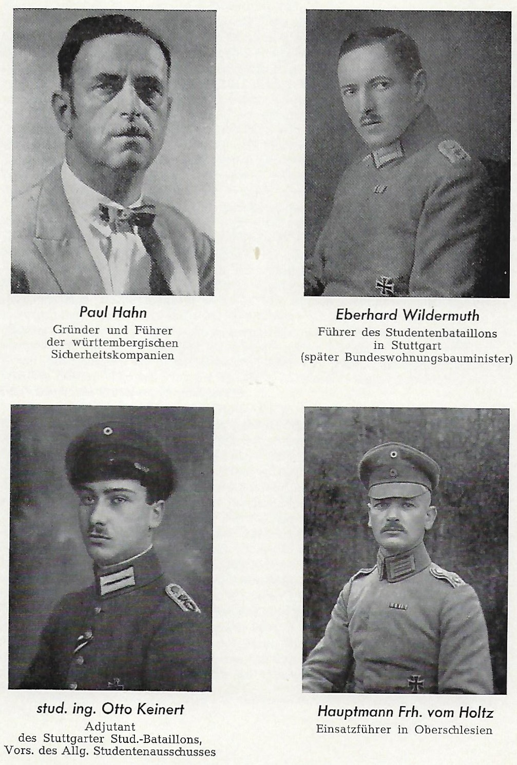 Stoßtrupp der Leipziger Zeitfreiwilligen